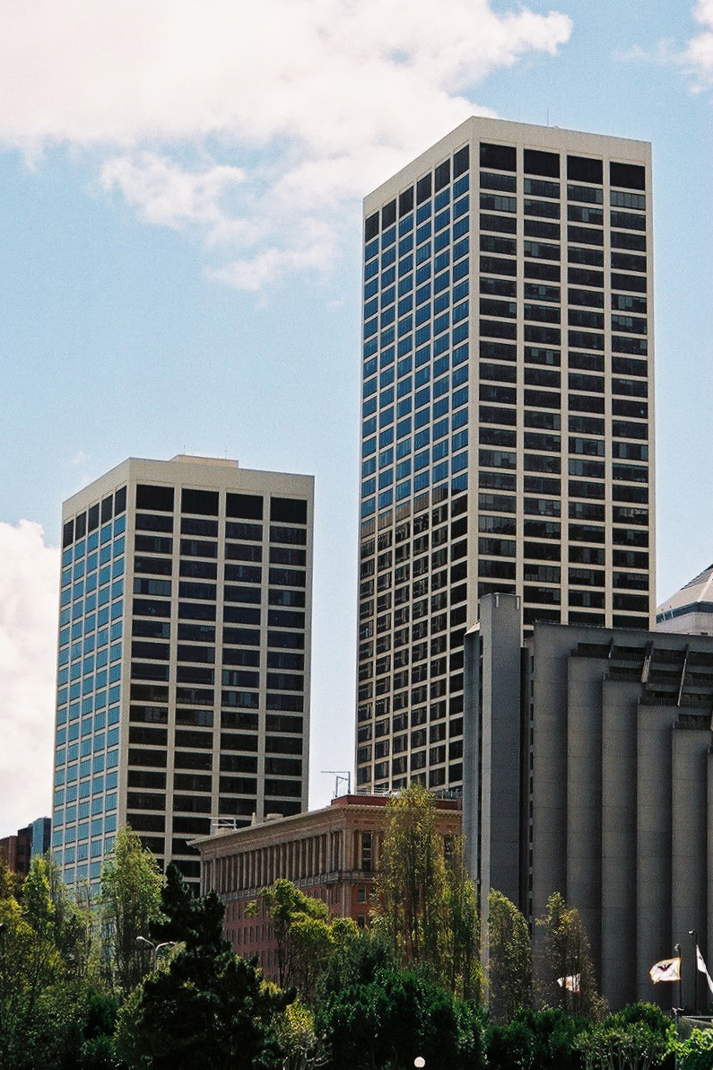 One Market Center